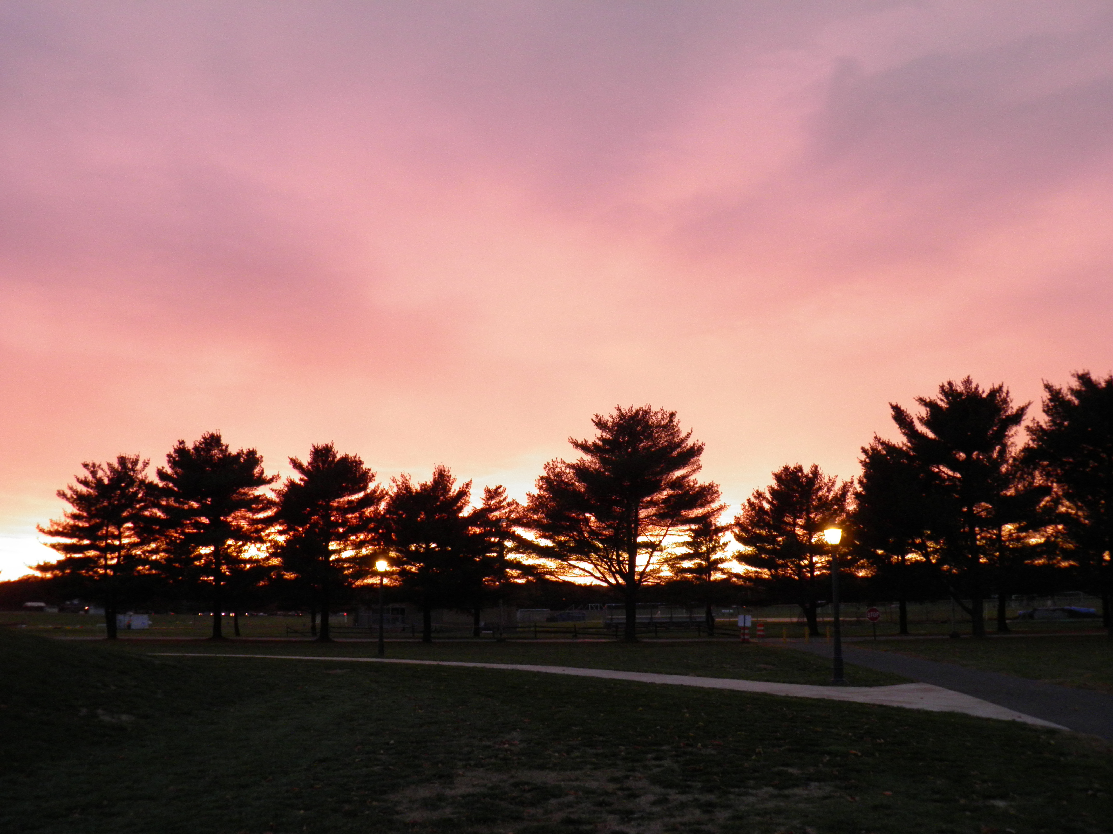 GCC at dusk/sunset